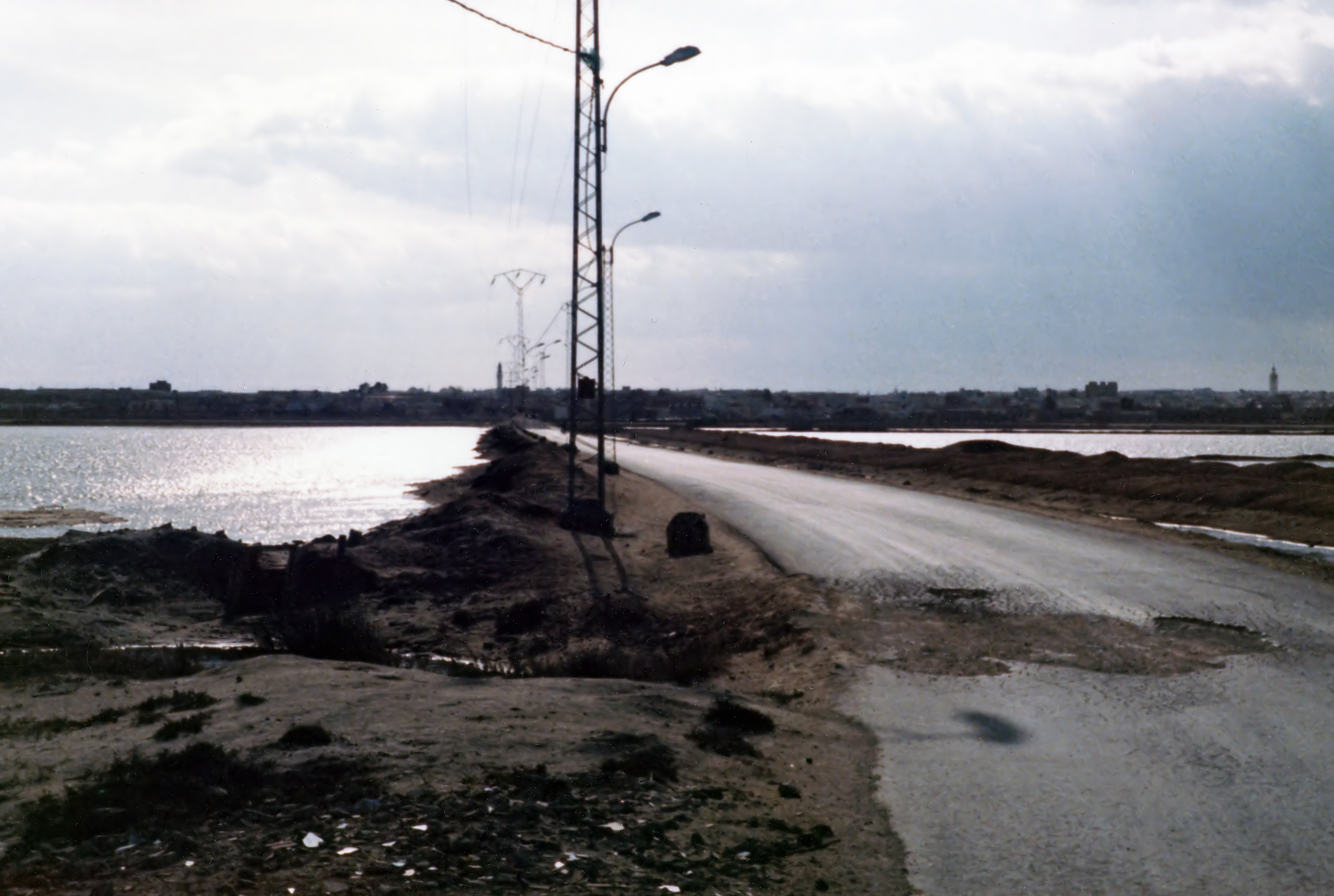 Around Sahline, Sahel, Tunisia